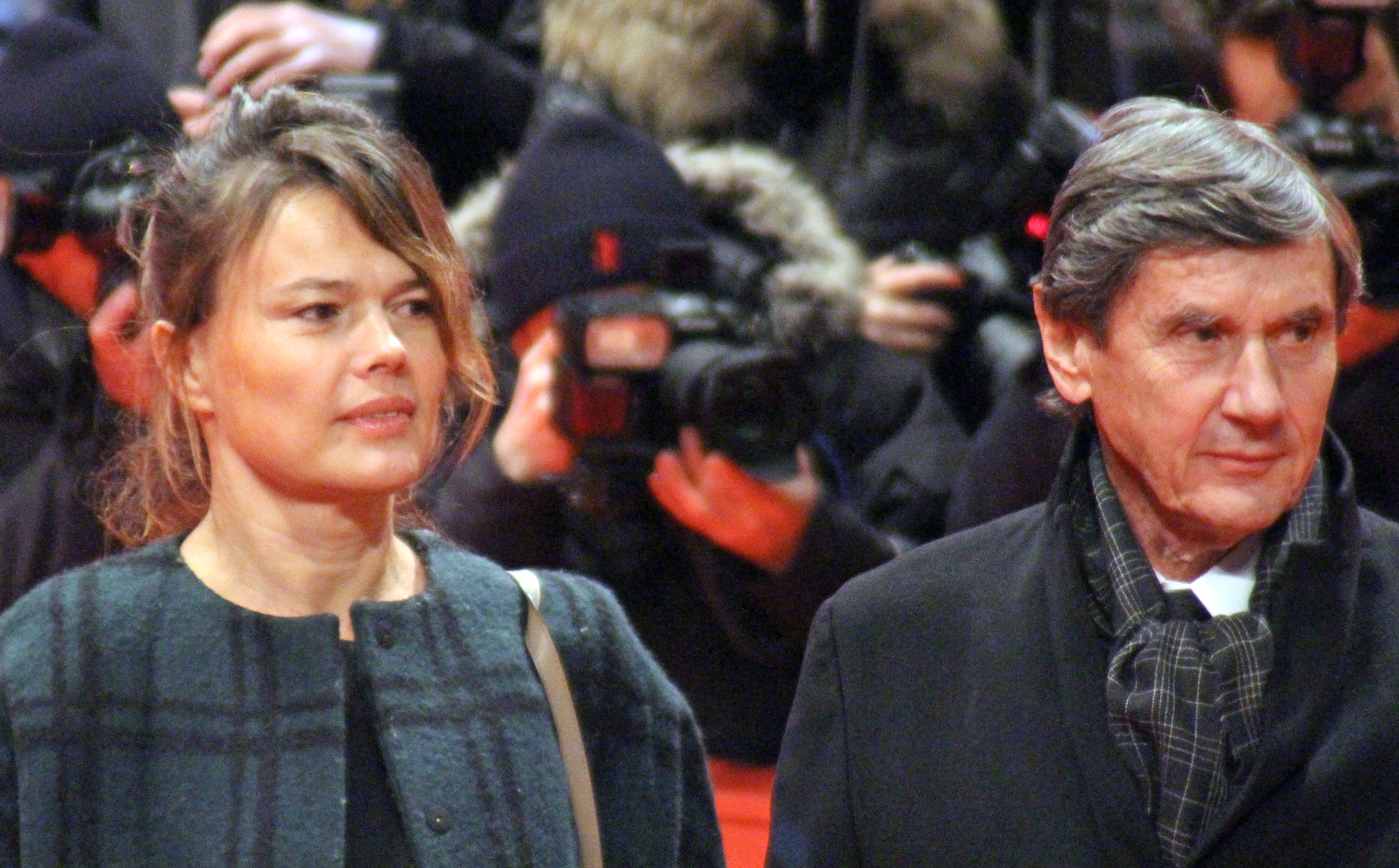 Kristina Larsen und Jean-Pierre Guérin bei der Premiere des Films Journal d’une femme de chambre bei der Berlinale 2015